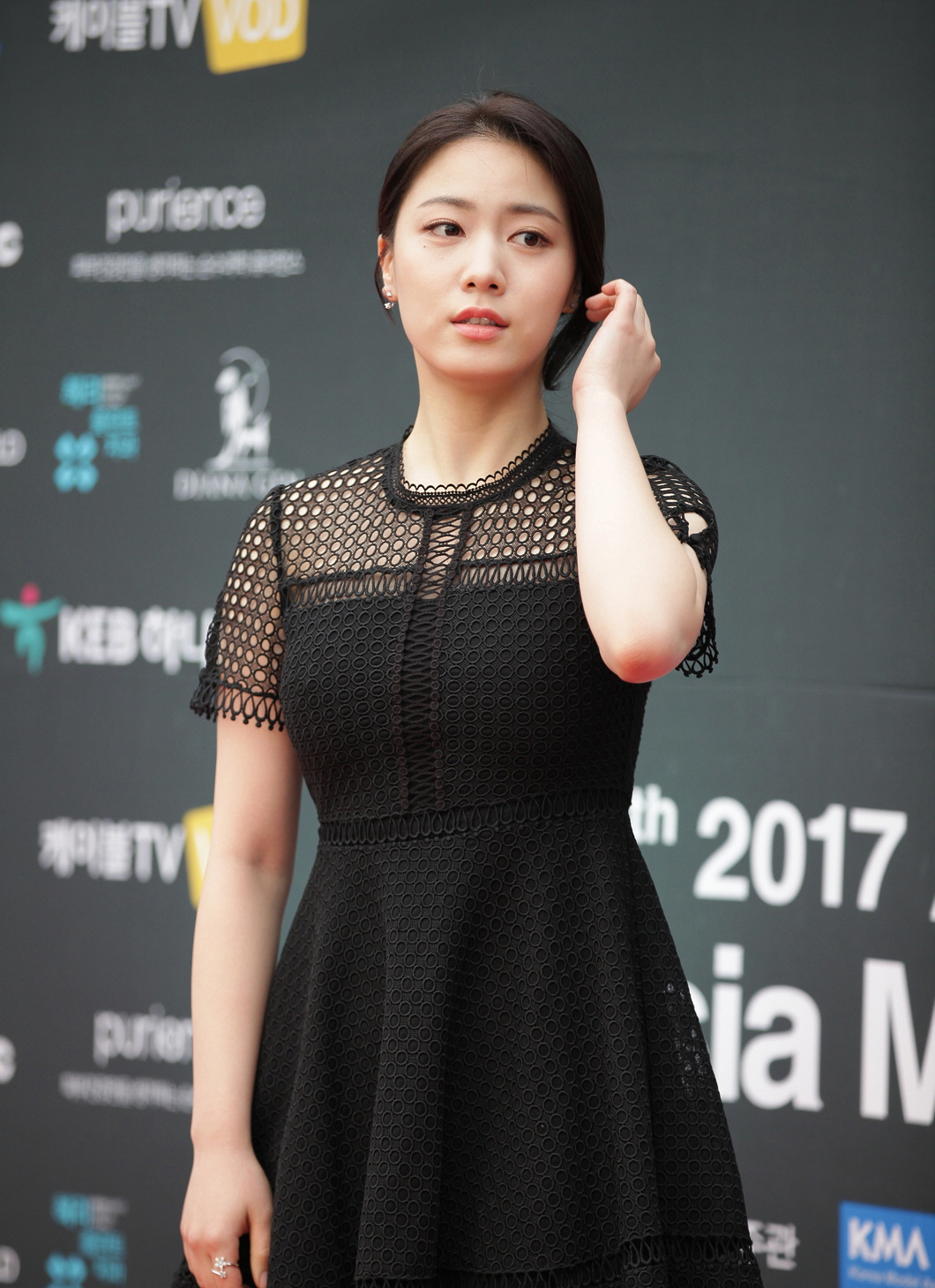 2017 아시아 모델 페스티벌 레드카펫